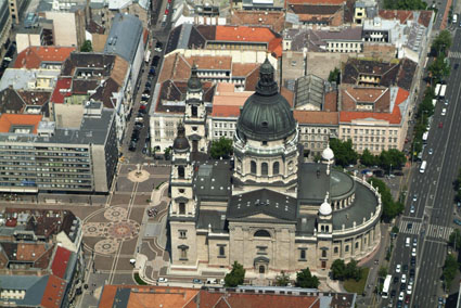 St István Bazilika, Budapest, Hungary, aerialphotography